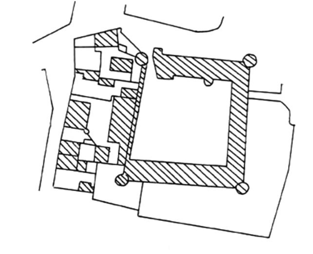 Sur le plan on voit que le château comprenait une courtine, plusieurs tours.